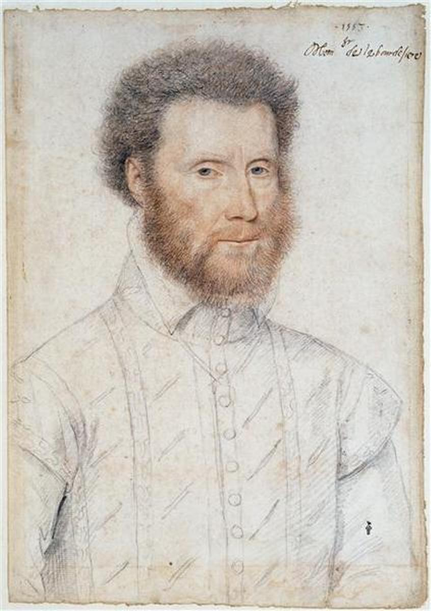 Jean Babou de La Bourdaisière (famille Babou de La Bourdaisière), comte de Sagonne, est le Grand-bailli de Touraine et le maître de l'Artillerie de France.